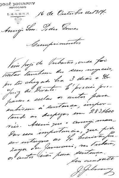 Carta familiar escaneada